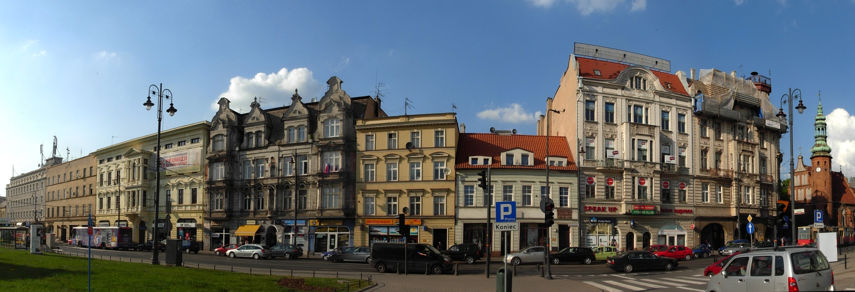 Ulica Ferdynanda Focha w Bydgoszczy